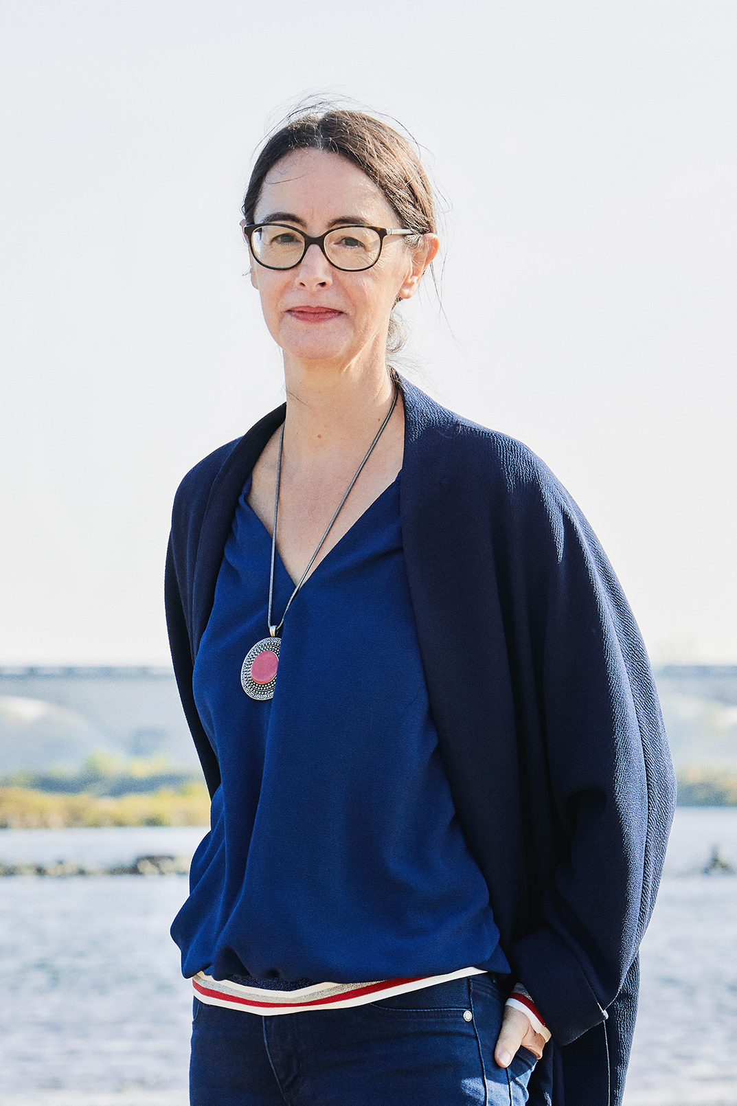 Elisabeth Filhol